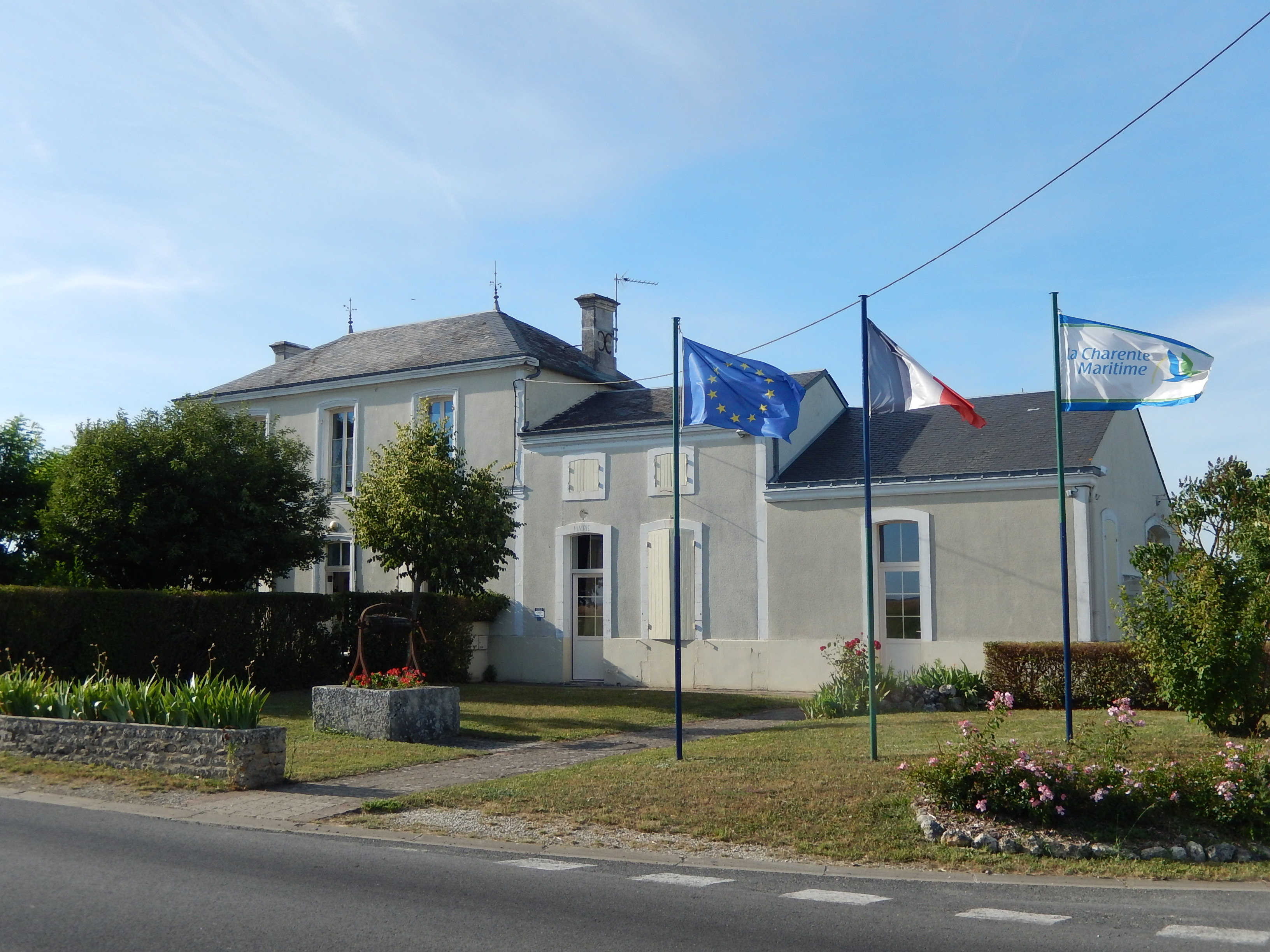 La mairie de Vergné, située dans le hameau de Tout-y-Faut.